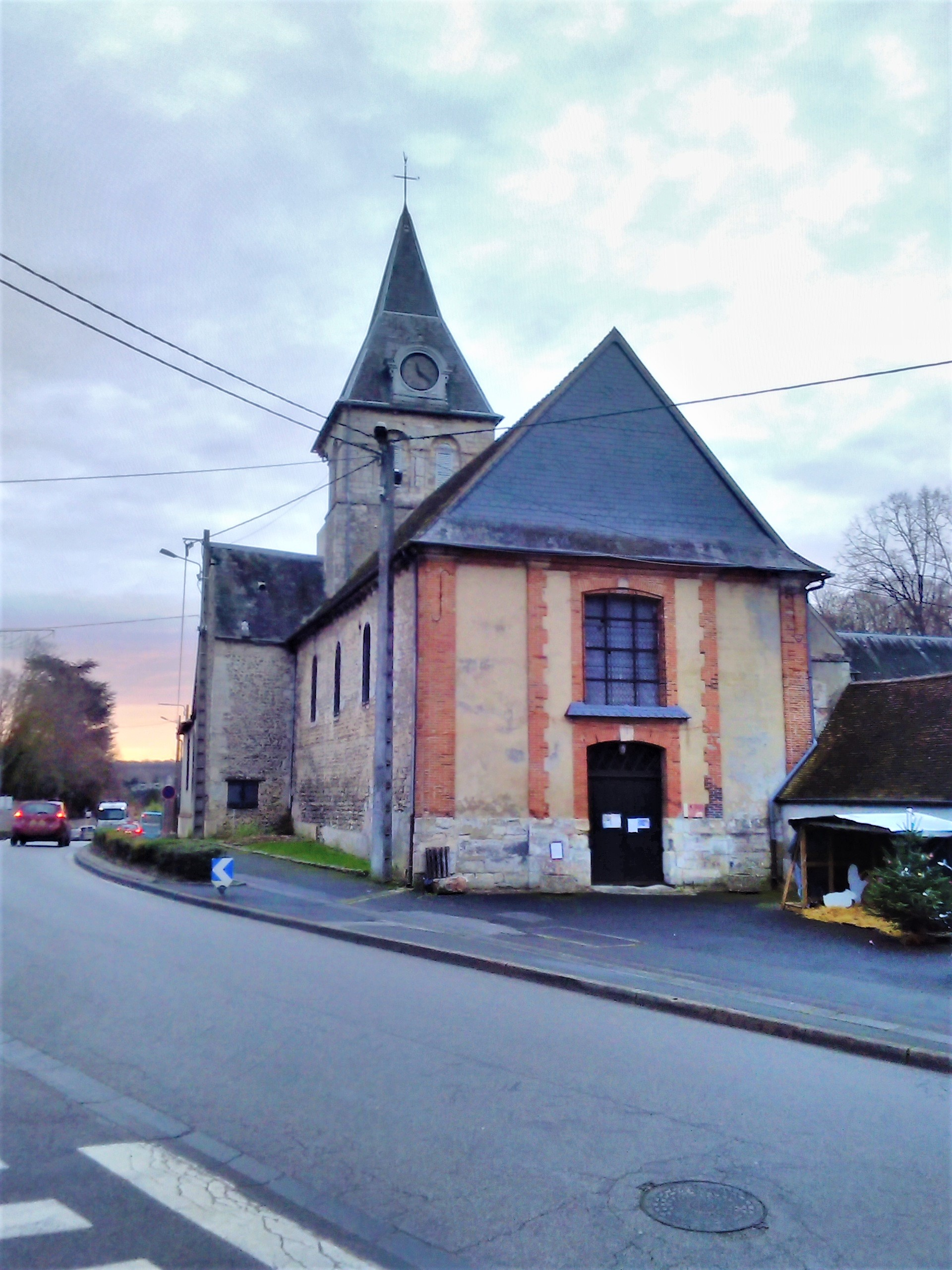 Tour de campagne du 19 décembre 2019.